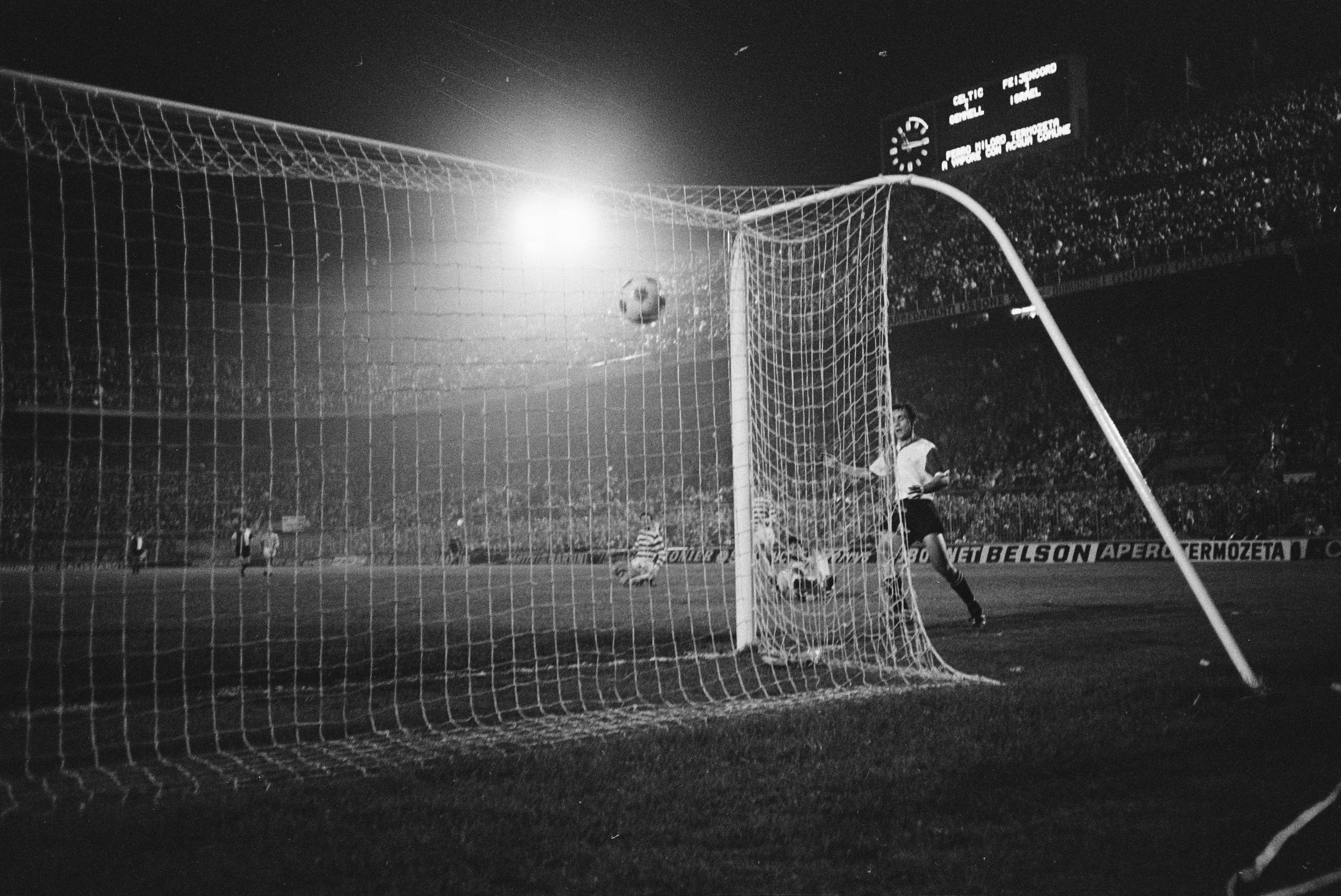 Collectie / Archief : Fotocollectie Anefo Reportage / Serie : [ onbekend ] Beschrijving : Celtic tegen Feijenoord 1-2 finale Europacup-I in Milaan: Kindvall (midden) scoort in verlenging het derde doelpunt Datum : 6 mei 1970 Locatie : Italië, Milaan Trefwoorden : sport, voetbal Persoonsnaam : Kindvall, Ove Instellingsnaam : Europacup, Feyenoord Fotograaf : Koch, Eric / Anefo Auteursrechthebbende : Nationaal Archief Materiaalsoort : Negatief (zwart/wit) Nummer archiefinventaris : bekijk toegang 2.24.01.05 Bestanddeelnummer : 923-5033